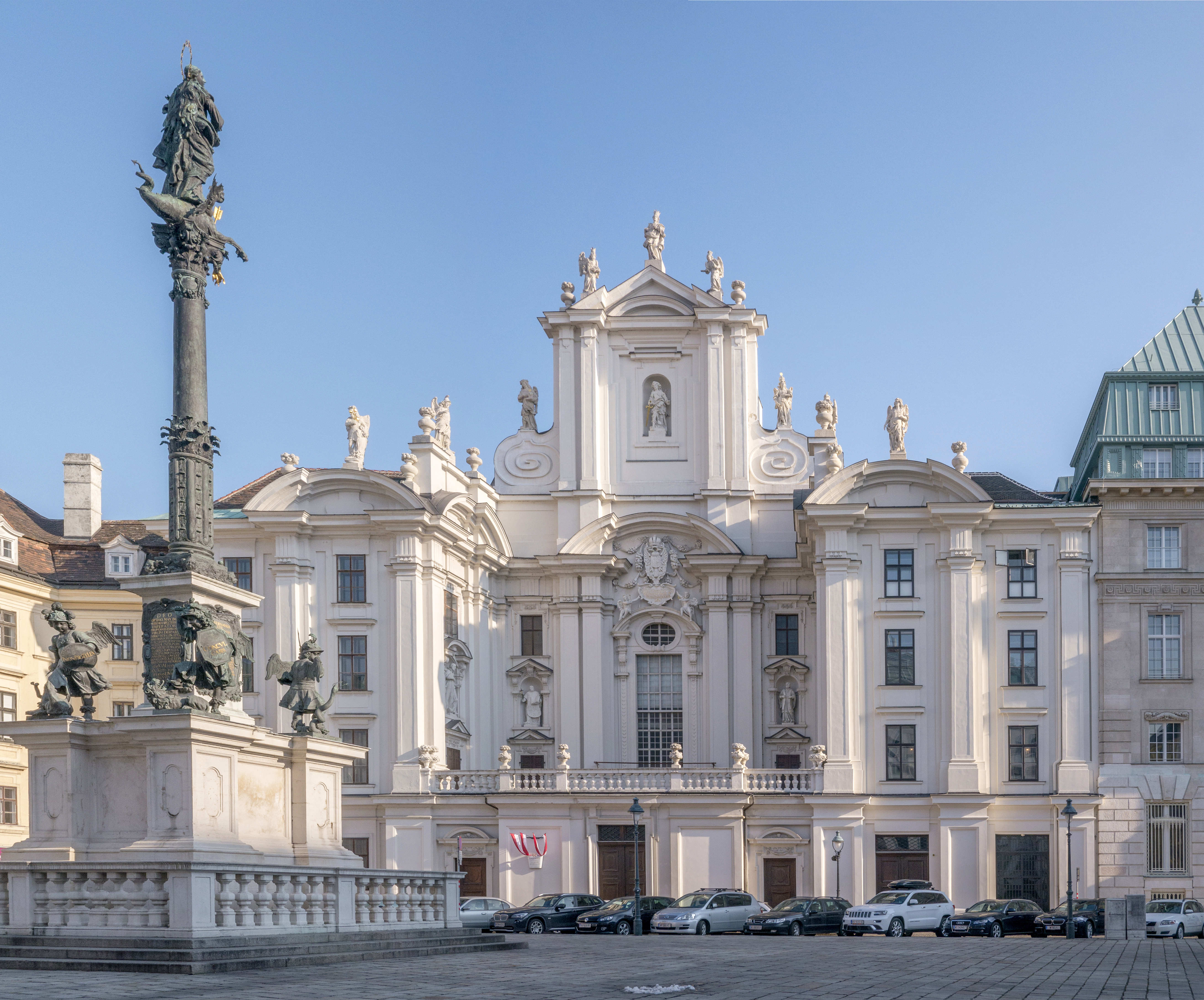 Kirche Am Hof, Zu den neun Chören der Engel, mit ehem. Profeßhaus